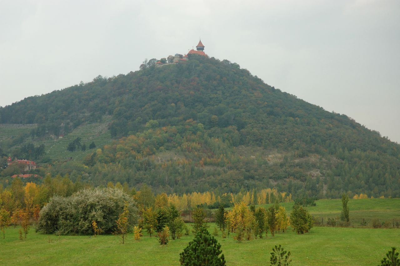 Vrch Hněvín (399 m n. m.) nad Mostem